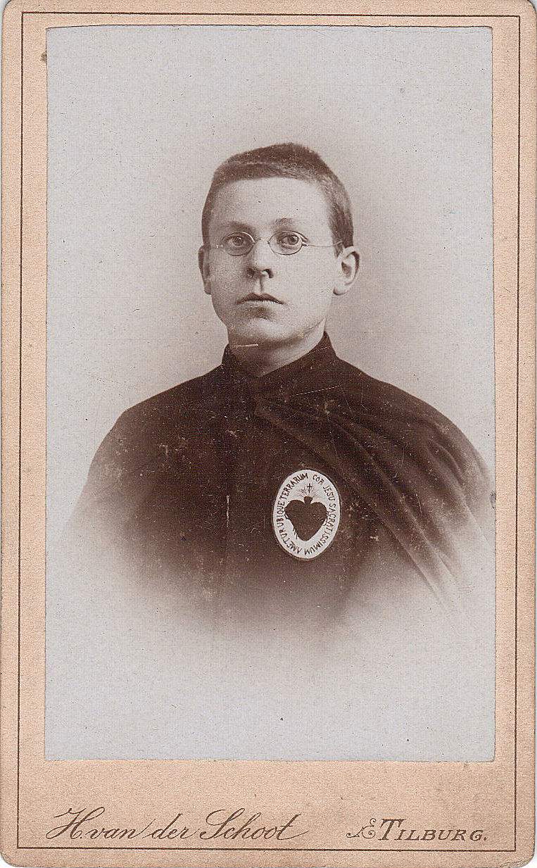 Portrait d'un séminariste néerlandais missionnaire du Sacré-Cœur de Jésus avec son insigne vers 1900.